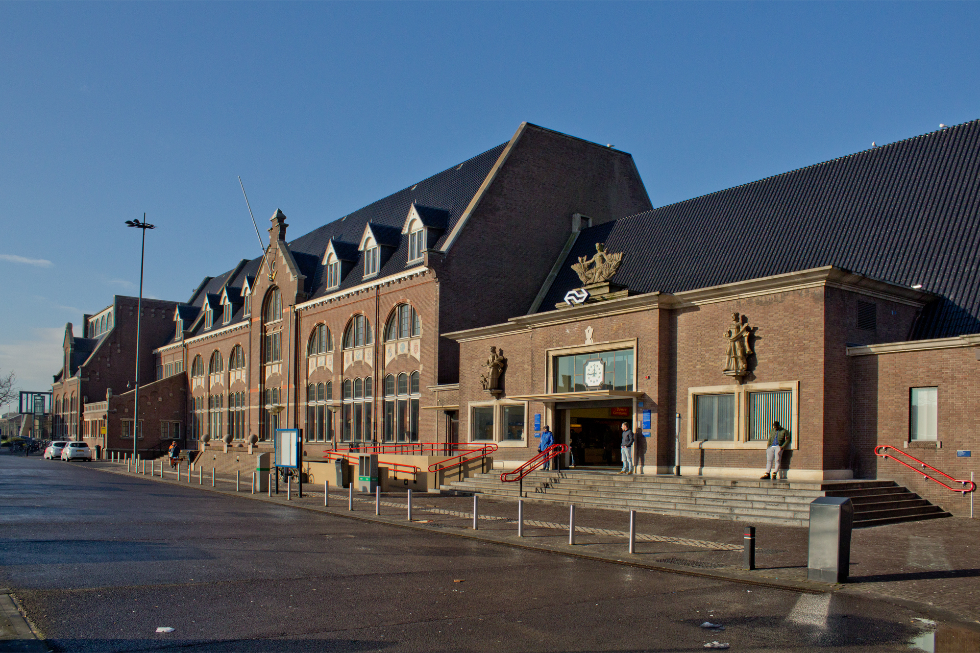 Station Roosendaal